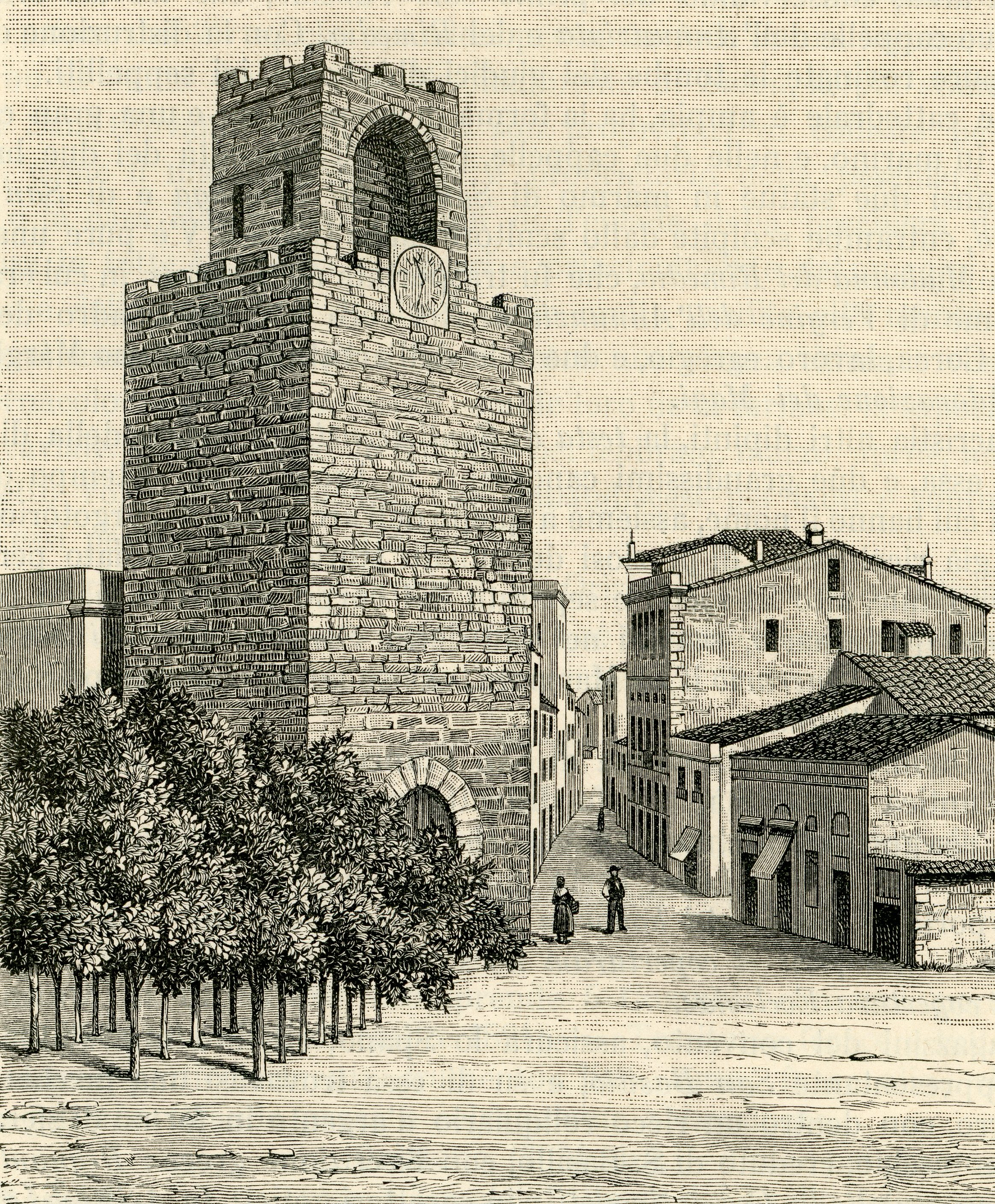 Oristano: piazza del mercato e torre San Cristoforo (incisore anonimo 1894).